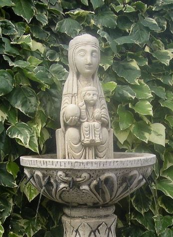 Verge de Montserrat a una font en Picanya